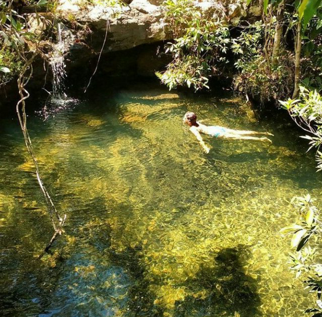 Poço Tranquilita, cachoeira Loquinhas